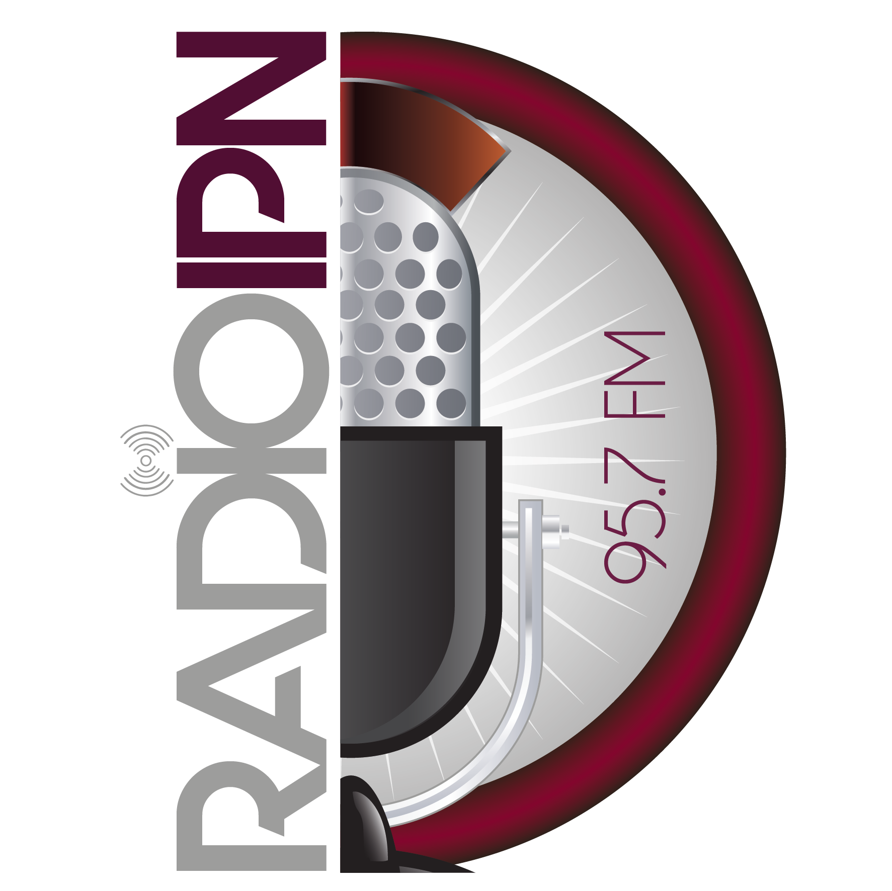 Logo oficial de la emisora. Actualizado en 2018.